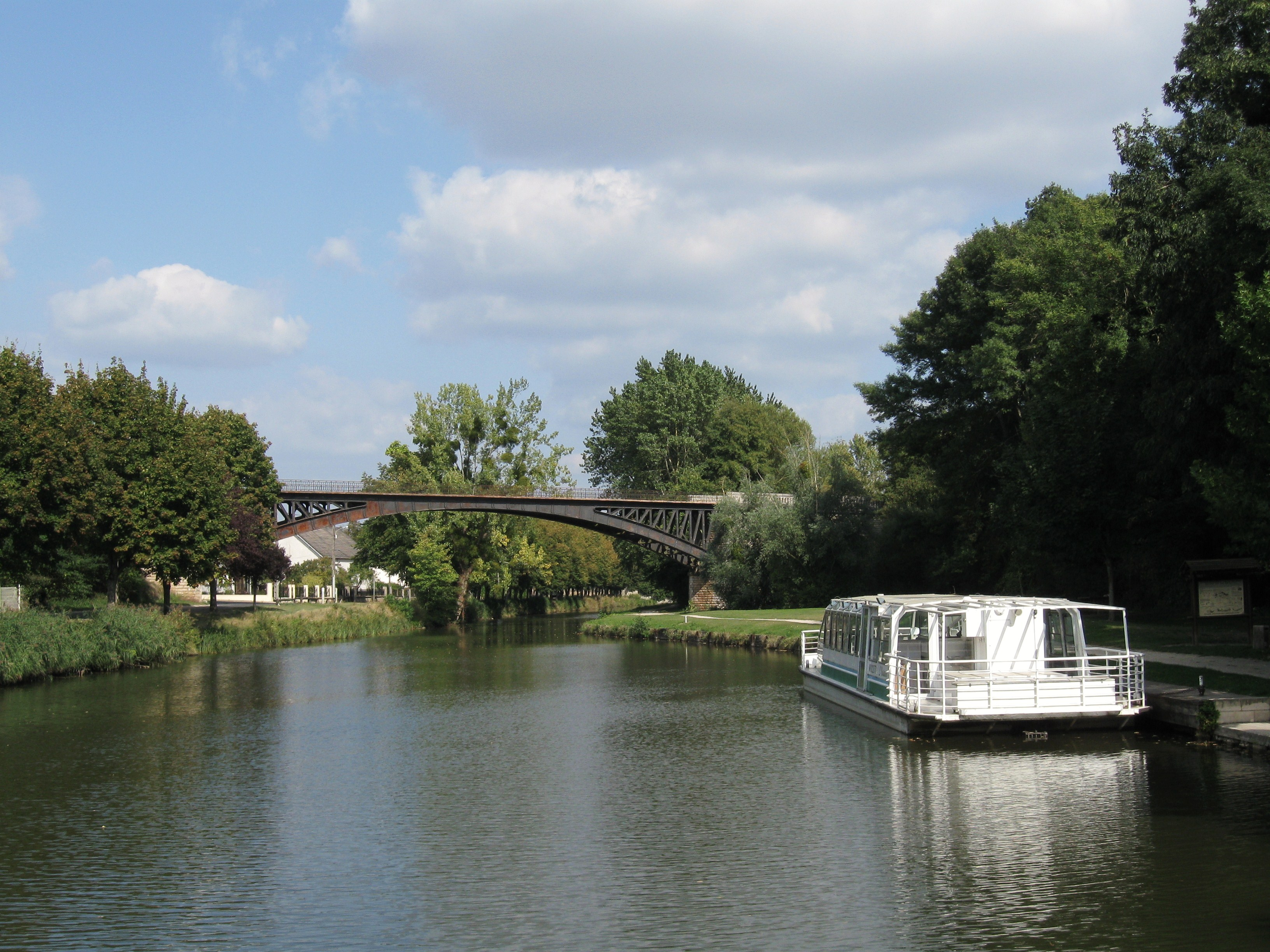 Canal d'Orléans, Mardié, Loiret, France